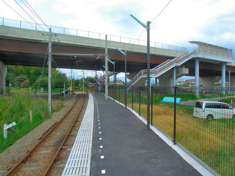 熊本電気鉄道新須屋駅ホーム（新駅） 奥が御代志駅方面、手前が北熊本駅方面。ホームを跨ぐ陸橋は熊本北バイパス、陸橋右手に見えるのは路線バス停留所。 撮影者/著者/著作権保有者 : MK Products (本人がアップロード) 撮影日 : 2008/8/12 新須屋駅用にアップロードした画像です。良い画像があれば別の画像に変えてください。 Description Shin-Suya Station , Kumamoto electric railway campany. GFDL Shin-Suya Station , Kumamoto electric railway campany.